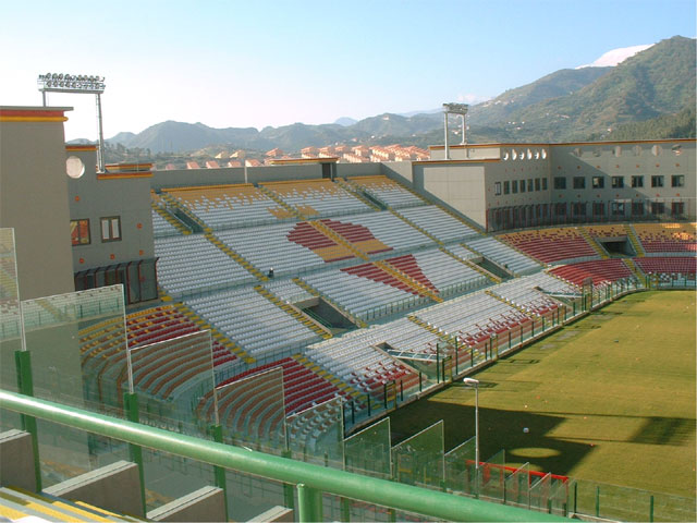 La curva sud